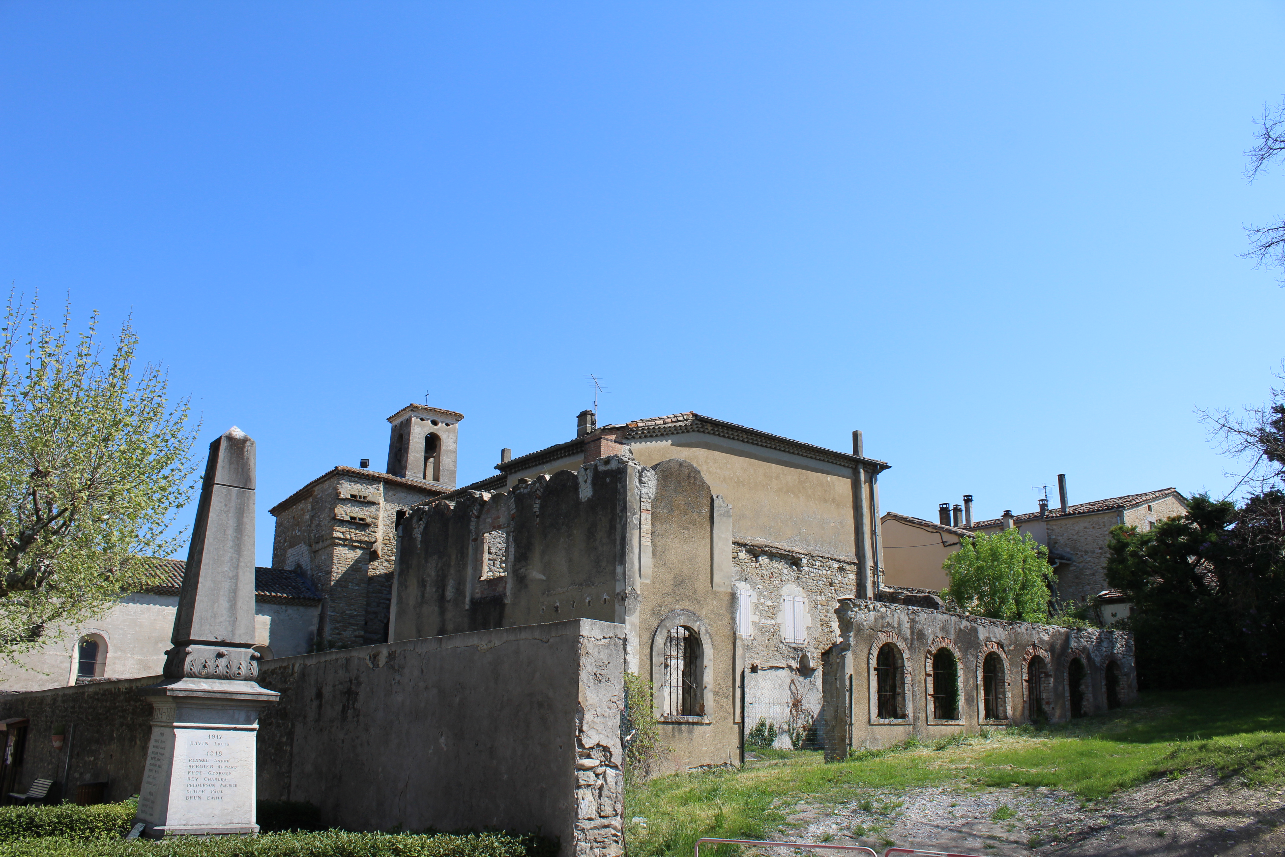 Photographie du Monastère de Piégros-la-Clastre